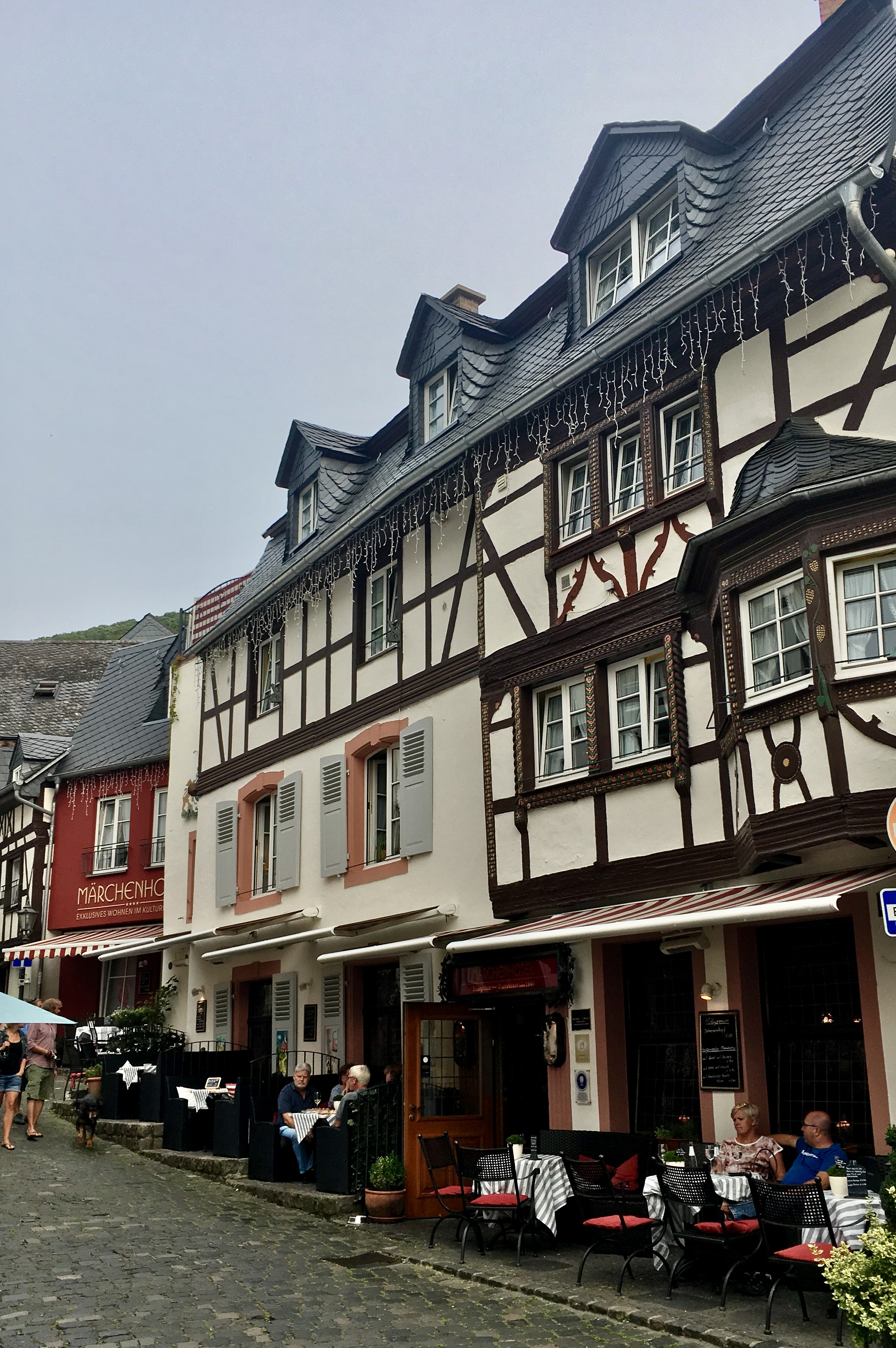 Älteste Weinstube in Bernkastel-Kues